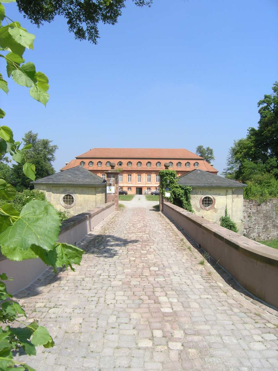 Gut Scheibenhardt